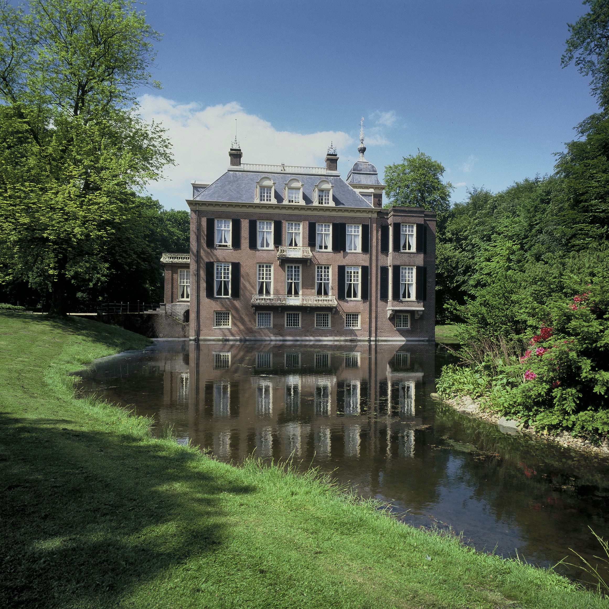 Huis Zijpendaal / Zypendaal: Overzicht van de rechter zijgevel (opmerking: Gefotografeerd voor het boek "Geldersche Kasteelen" door J.C. Bierens de Haan en J.R. Jas)